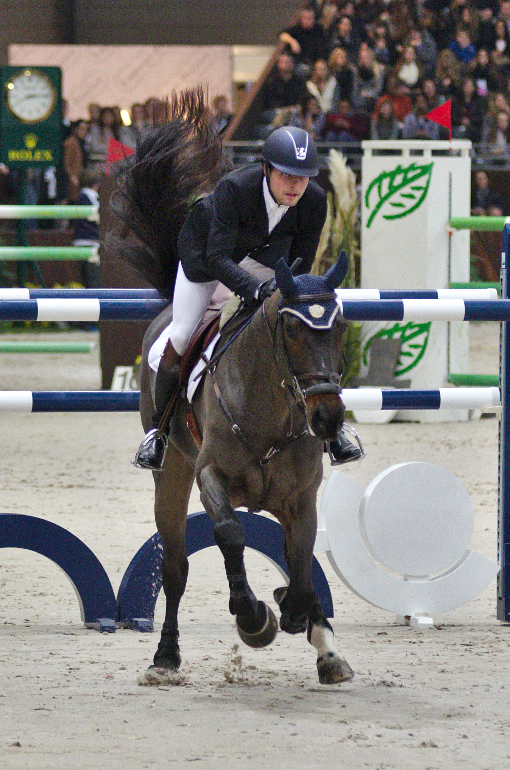 CHI Genève 2013 - 20131214 - Daniel Bluman et Sancha LS